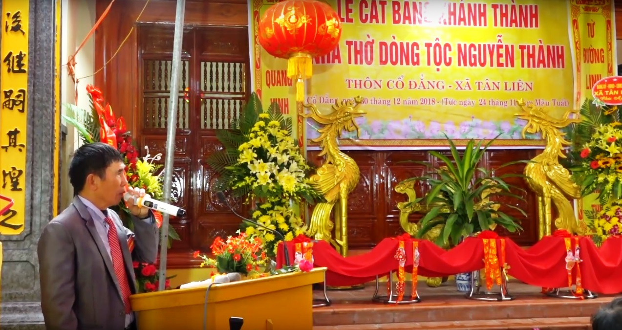 Nhà thờ dòng tộc Nguyễn Thành ở thôn Cổ Đăng, xã Tân Liên, huyện Vĩnh Bảo, thành phố Hải Phòng.